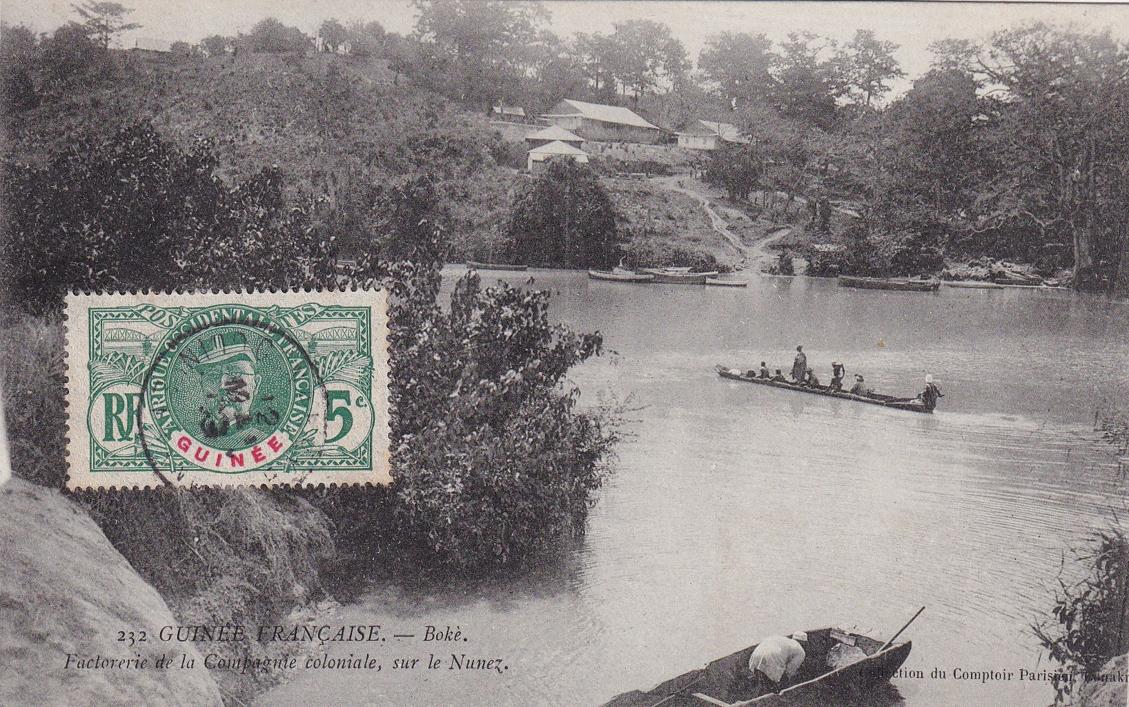 Carte postale - Factorie de la Compagnie coloniale sur le Rio Nunez, Boké, Guinée française